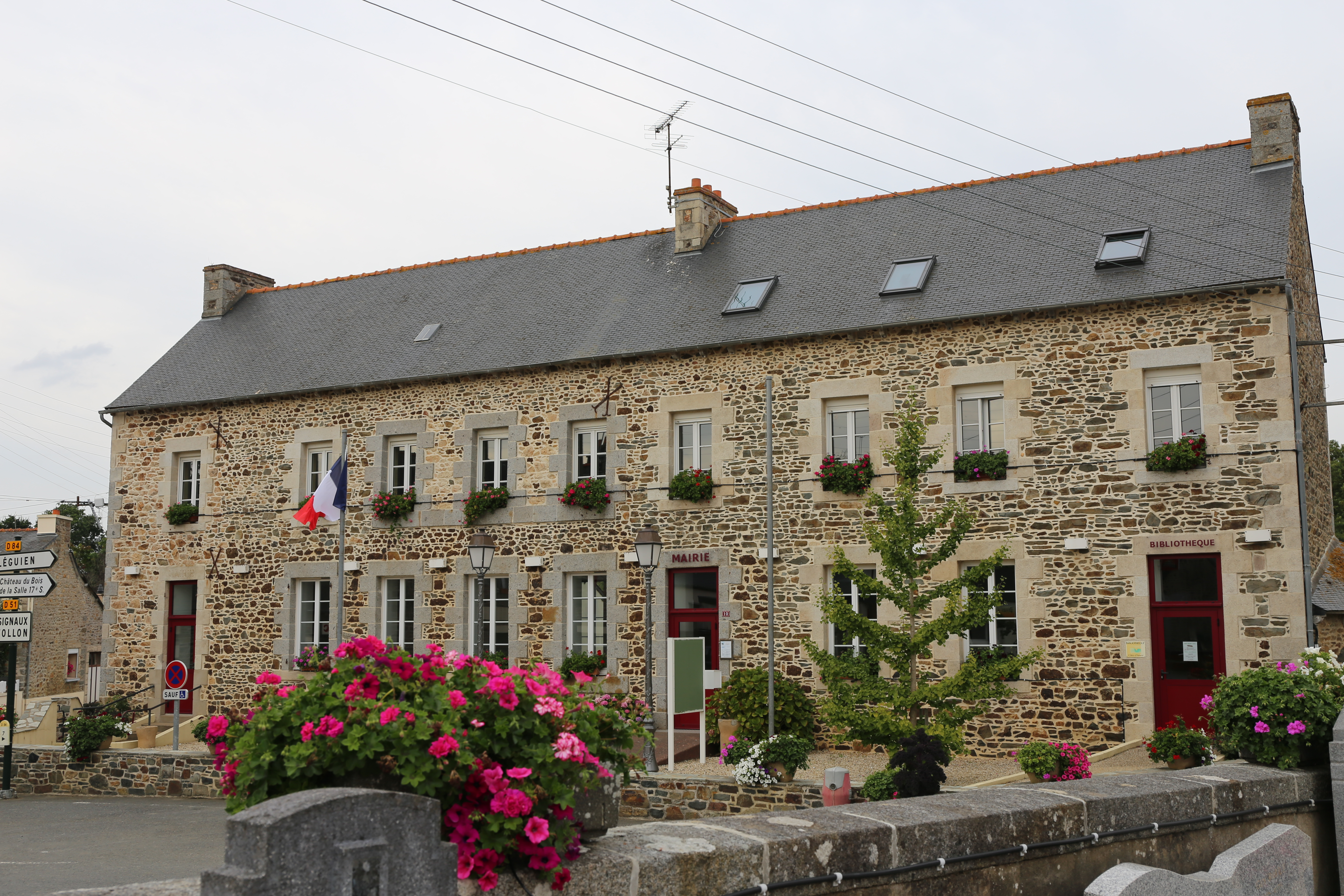 Ti-kêr Tregedel.